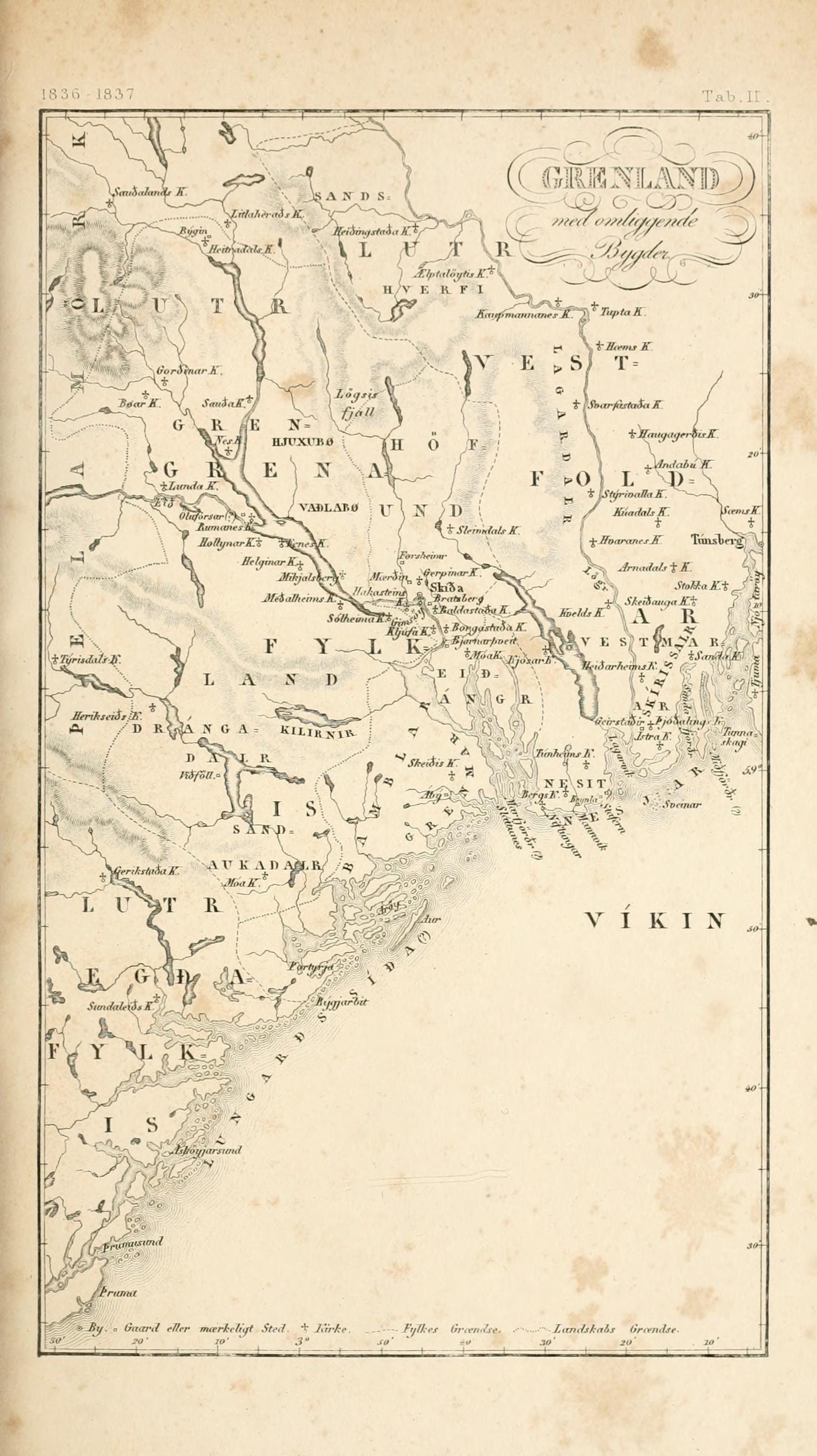 «Grenland med omliggende Bygder». Kart tegnet av P. A. Munch som illustrasjon til hans avhandling «Om Beliggenheden af det gamle Grenland, Grenmar og andre Steder, som i Oldskrifterne nævnes i Forbindelse dermed», i Annaler for nordisk Oldkyndighed I (1836).